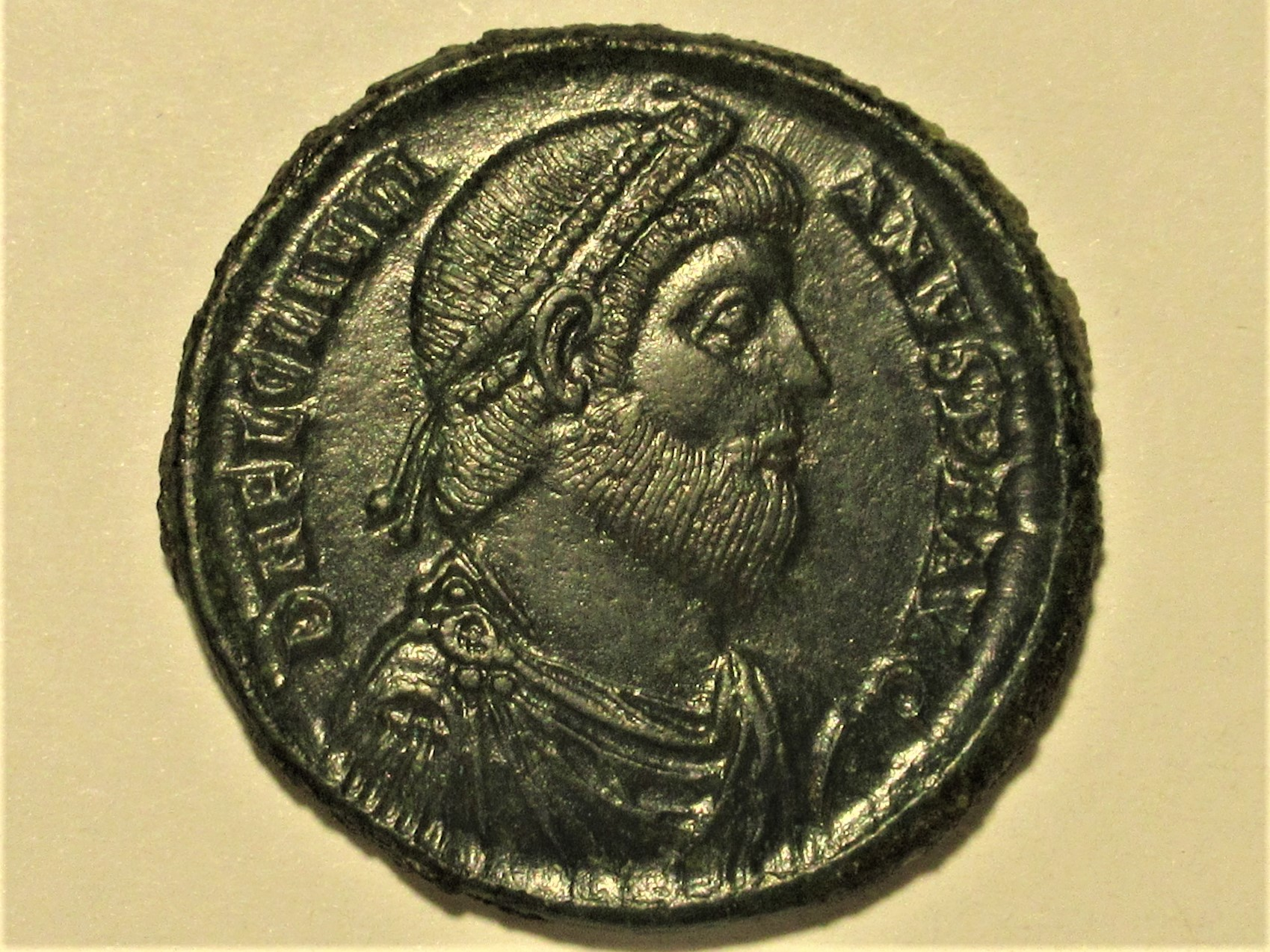 große Bronzemünze des Julianus II mit Bart, Kampmann 153.33